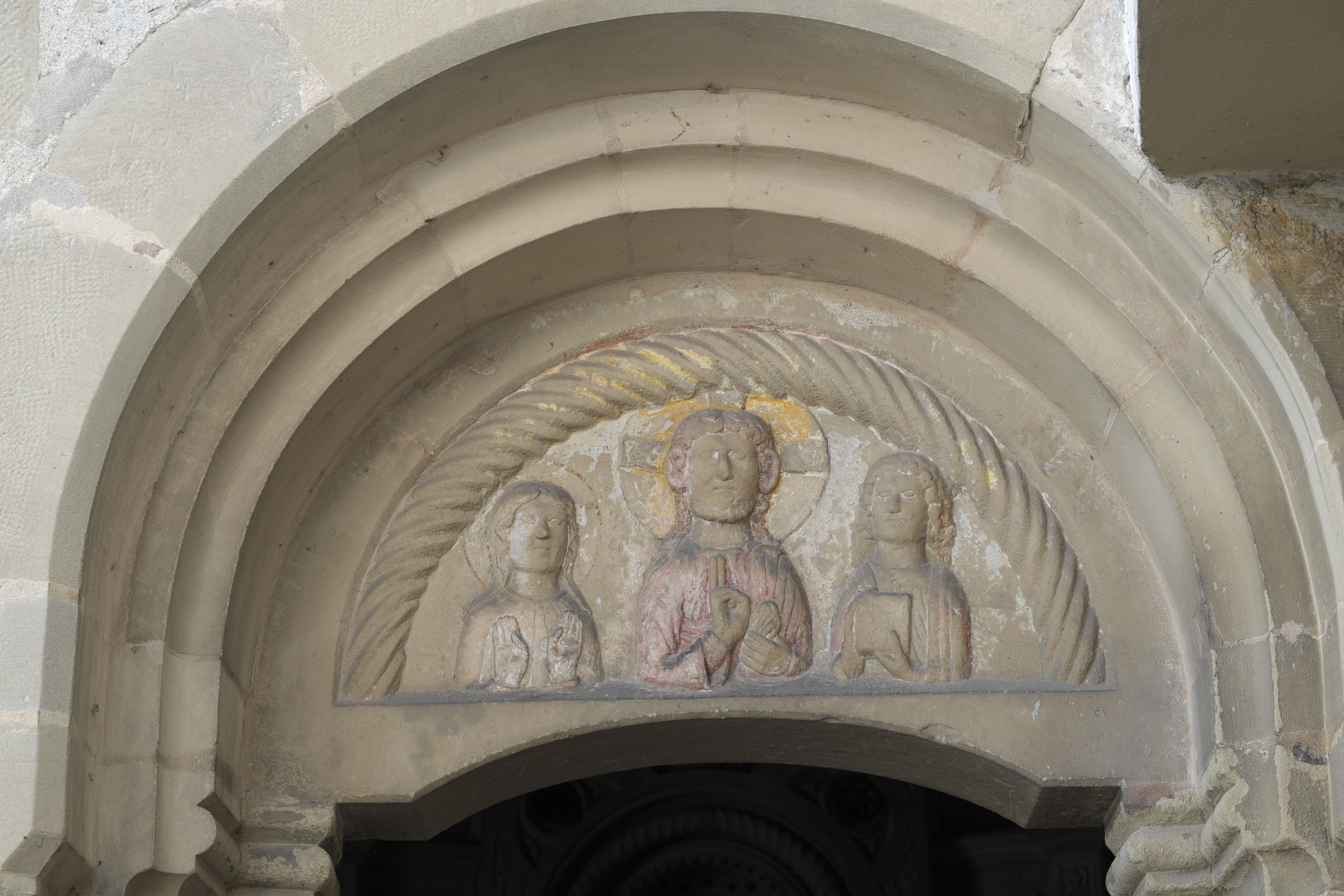 Johanneskapelle des ehemaligen Prämonstratenserklosters in Steingaden im Landkreis Weilheim-Schongau (Bayern/Deutschland), romanisches Tympanon aus dem späten 12. Jahrhundert, Darstellung: Jesus, Maria und der Evangelist Johannes